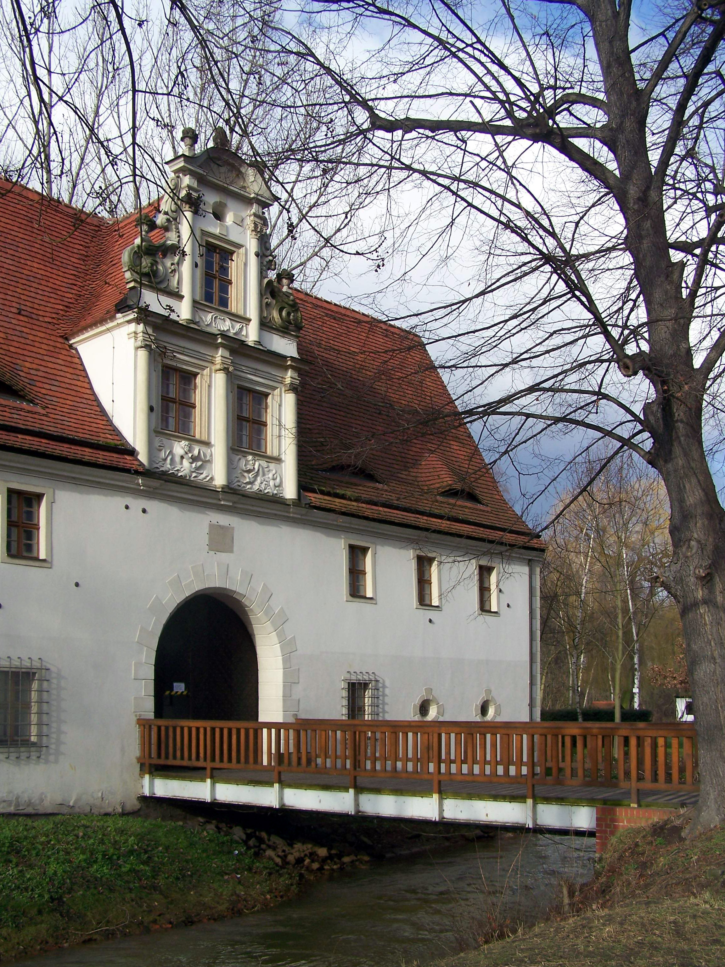 Torhaus Dölitz, Museum zur Völkerschlacht bei Leipzig